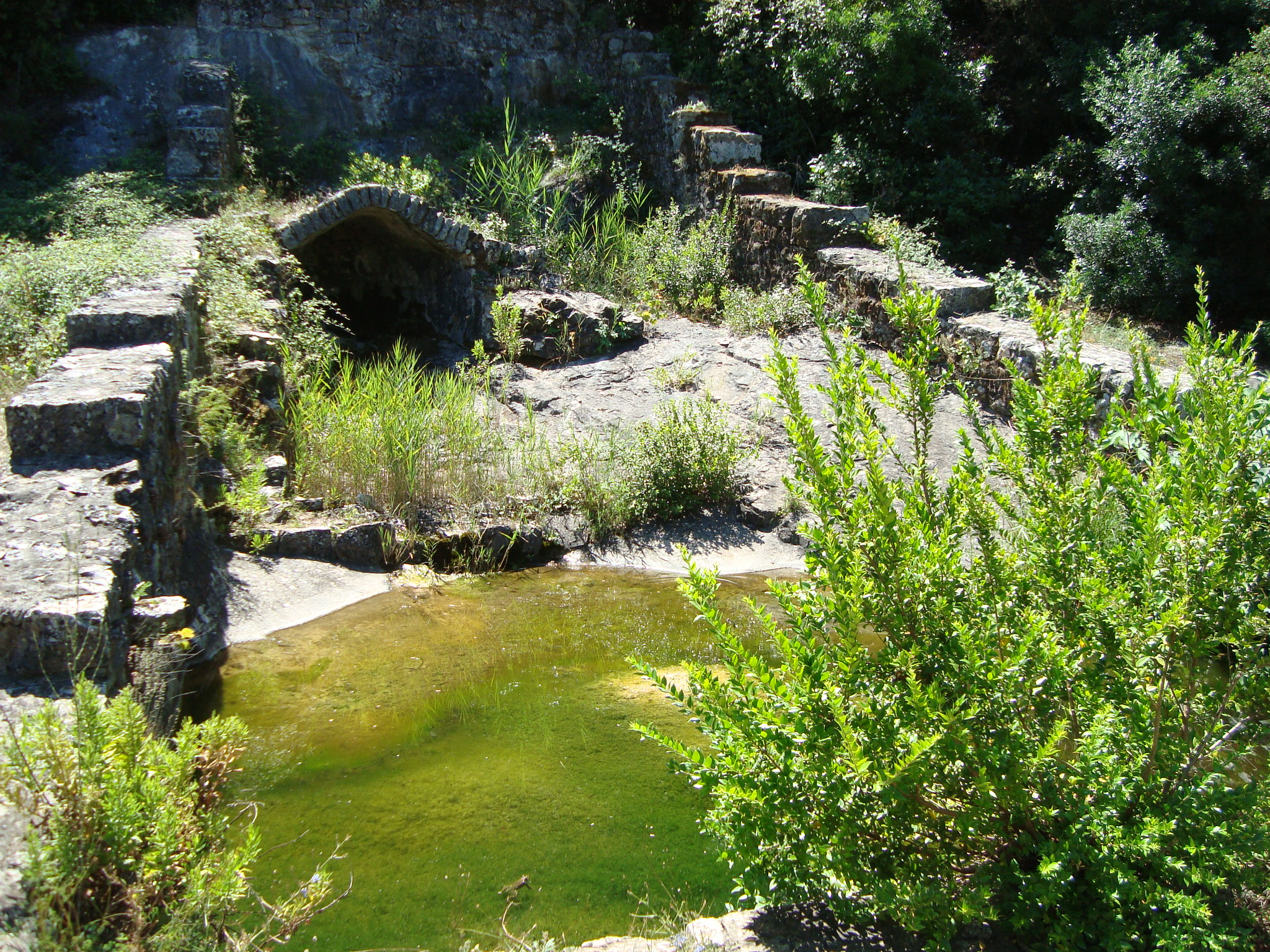 Vilino vrelo, izvor pitke vode nedaleko od Polača na Mljetu, Hrvatska